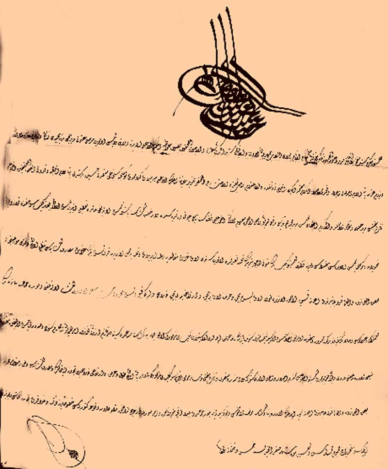 Султански ферман за строеж на църквата в село Чокманово – 1888 г.